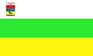 Прапор Старобільська